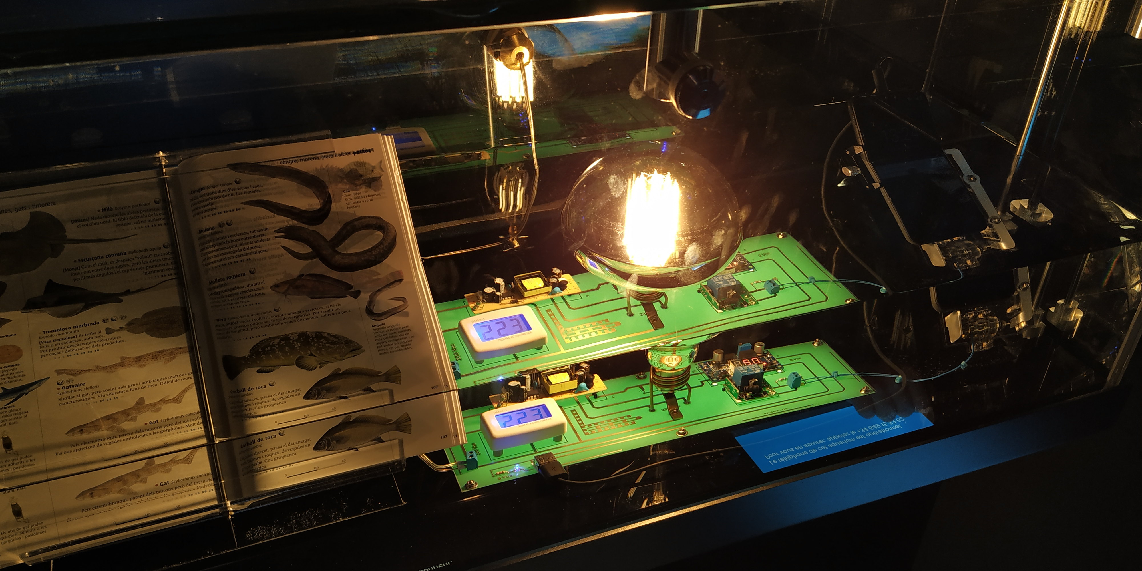 Muntatge utilitari del Cosmo Caixa (Barcelona, Catalunya) on es mostren diferents elements no danyats i funcionant correctament tot i trobar-se submergits en Novec1230: -Un llibre -El funcionament sense cap incidència d'un circuit elèctric que encèn una bombeta i presenta un voltímetre -Un telèfon mòbil